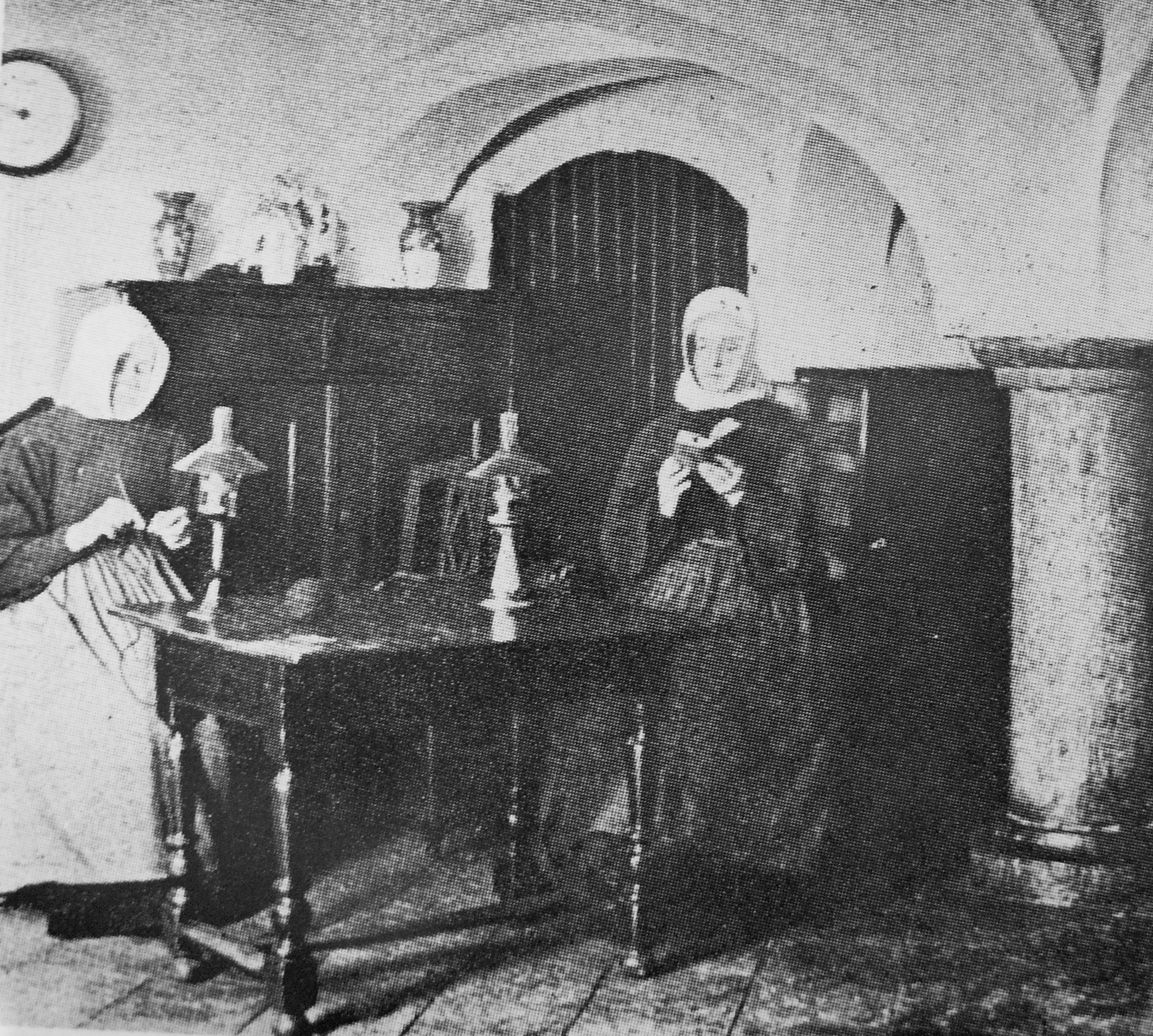 Salle de garde de l'ancien hôpital de Bavière, Liège